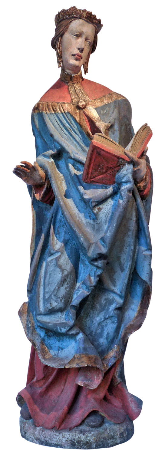 Statue en bois polychrome et doré de Sainte Elisabeth de Hongrie, au Musée de l'Oeuvre Notre-Dame, Strasbourg. Bavière, vers 1520, atelier de Hans Leinberger (entourage)